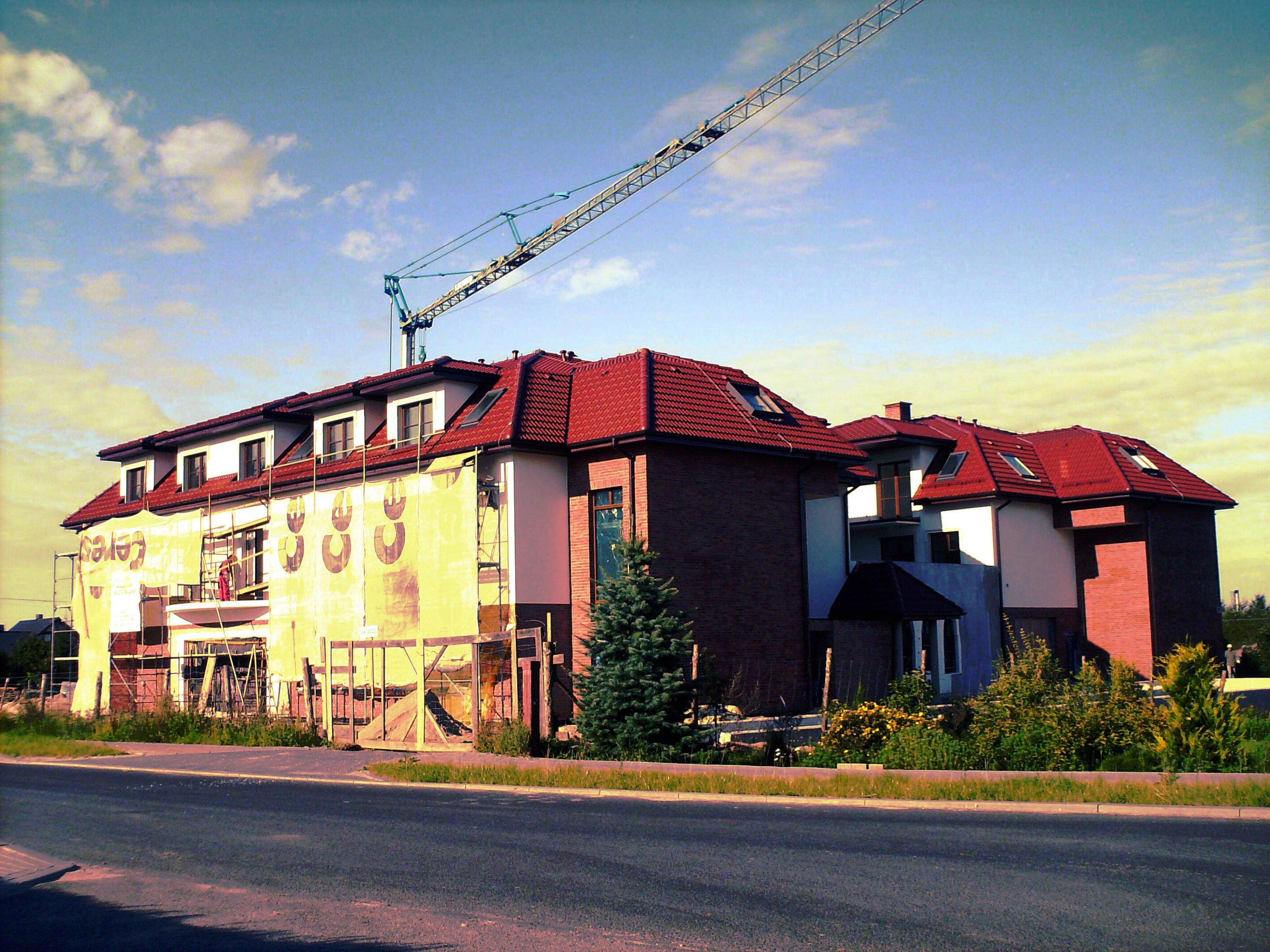 Zdjęcie z trwającej budowy.